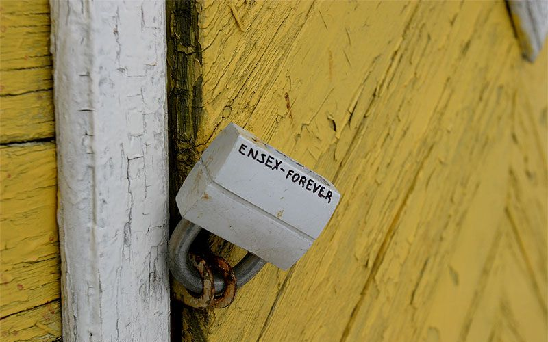 фотография с игры